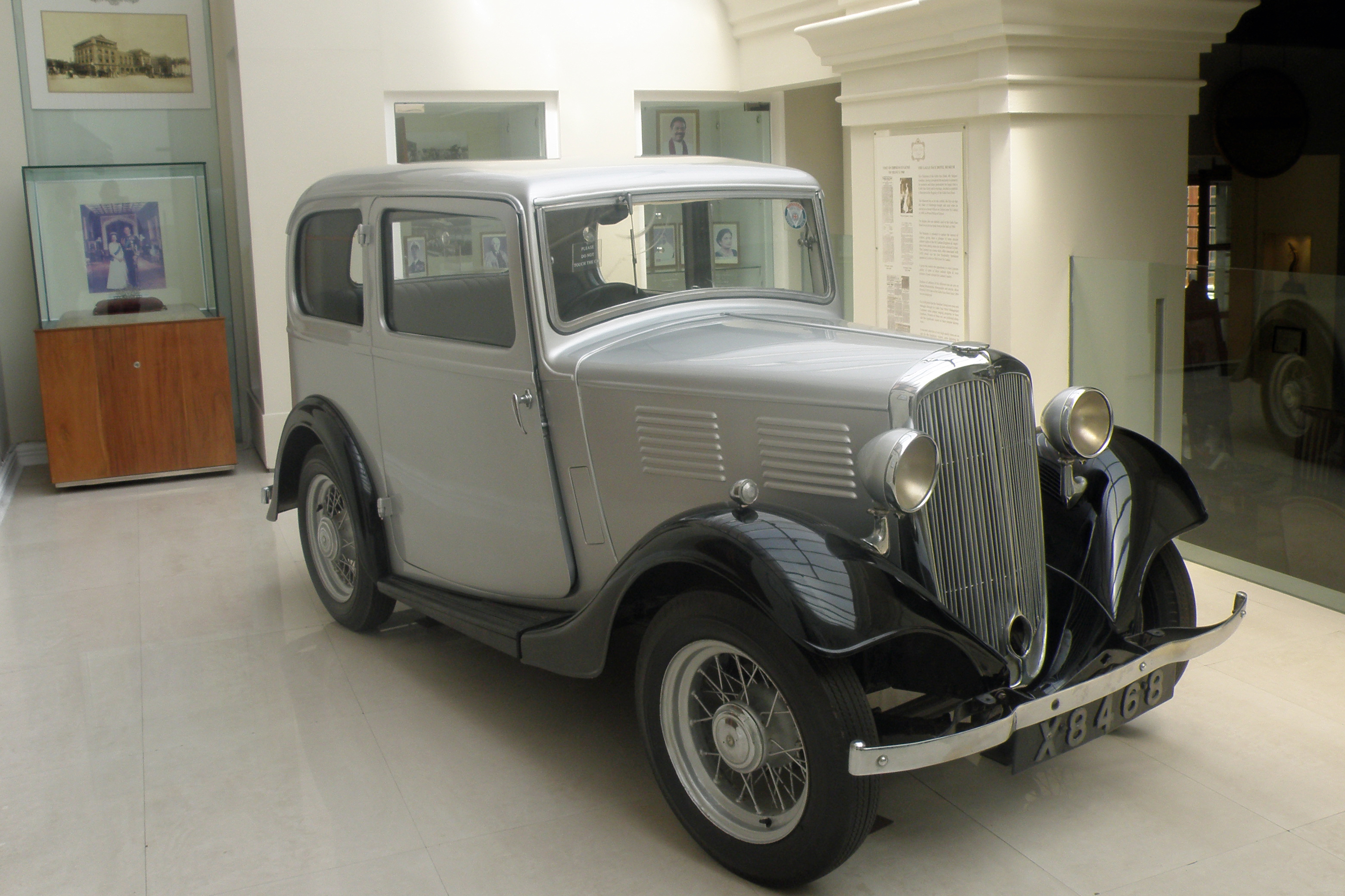 Sri Lanka - Colombo - Hôtel Galle Face - La Standard 9 Modèle 1935 du prince Philippe de Grèce et de Danemark, futur prince consort du Royaume-Uni